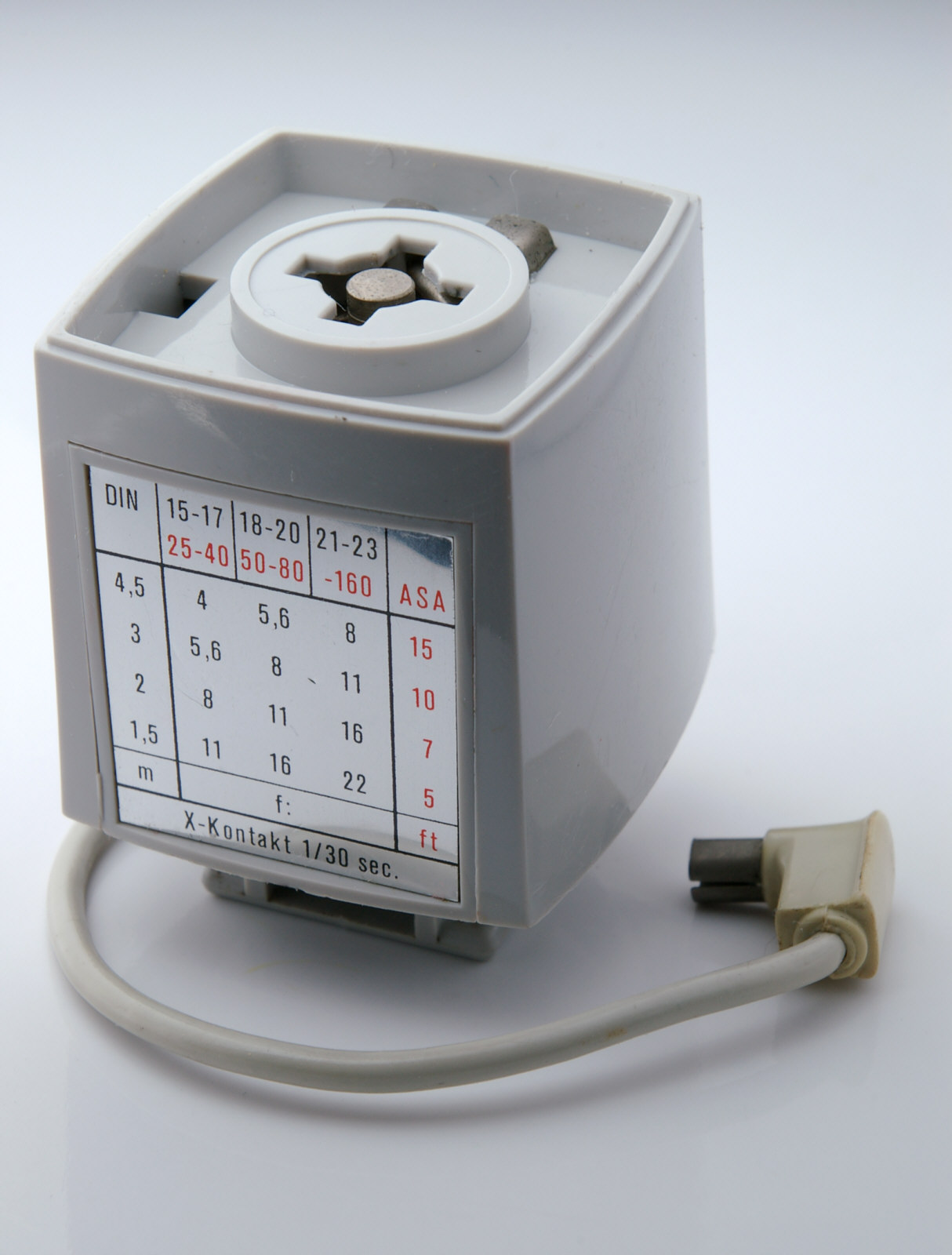 Blitzwürfelgerät für elektrisch gezündete Blitzfürfel. Anschluß an die Kamera über X-Mittenkontakt oder Kabel. Betrieb mit einer Quecksilberfotobatterie PX-23 5.6V